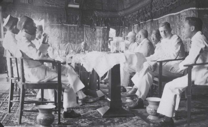 Foto. Groepsportret ter ere van het bezoek van de kroonprins van België in het paleis van de sultan van Soembawa. Prins Leopold, de latere koning Leopold III, bezocht Nederlands-Indië in 1928-1929 en in 1932.